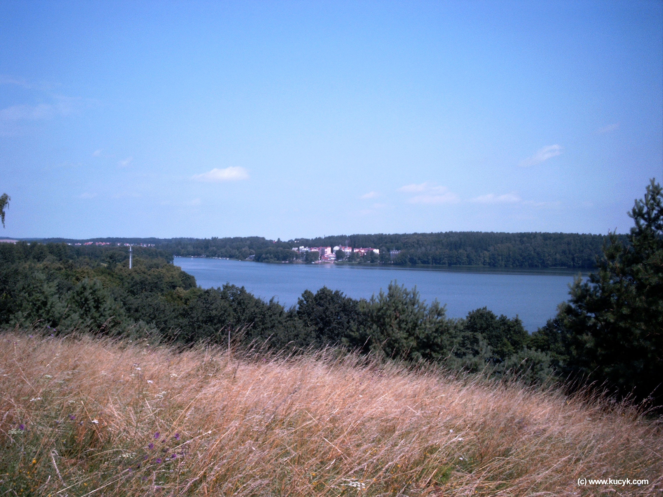 Widok na jezioro Czos z górki